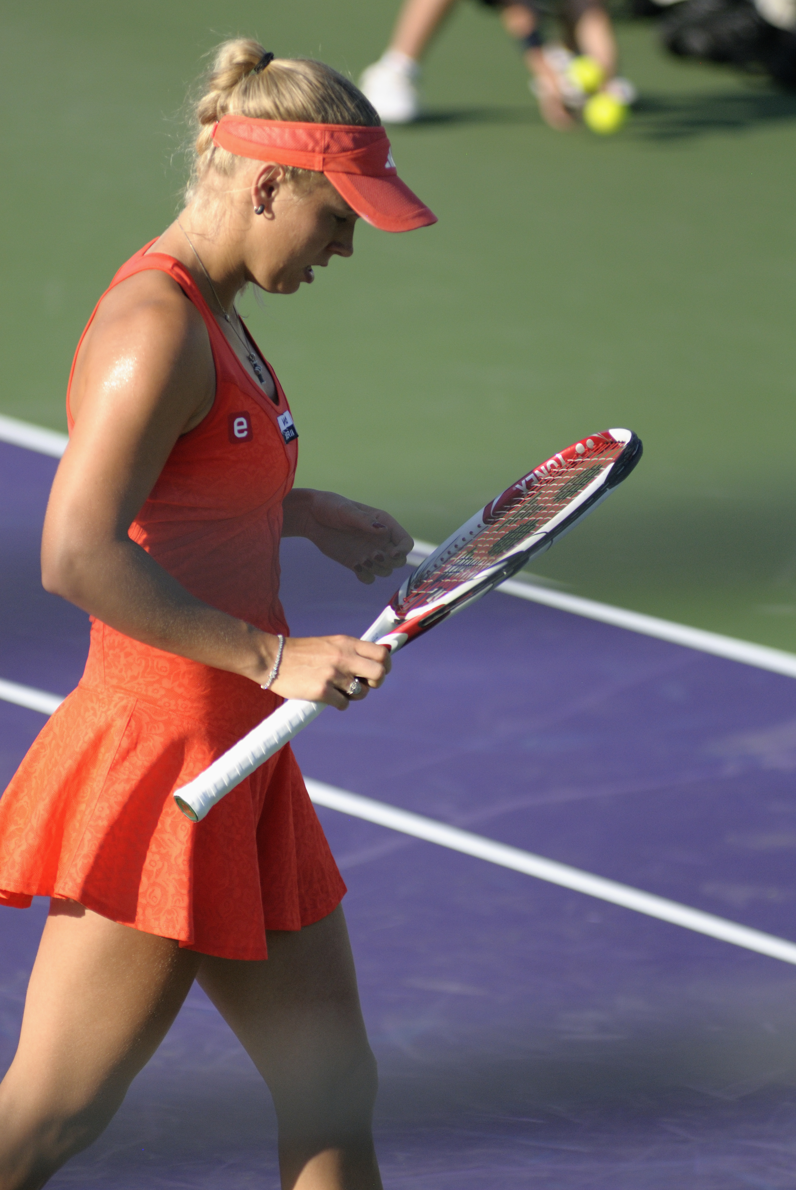 Caroline Wozniaki